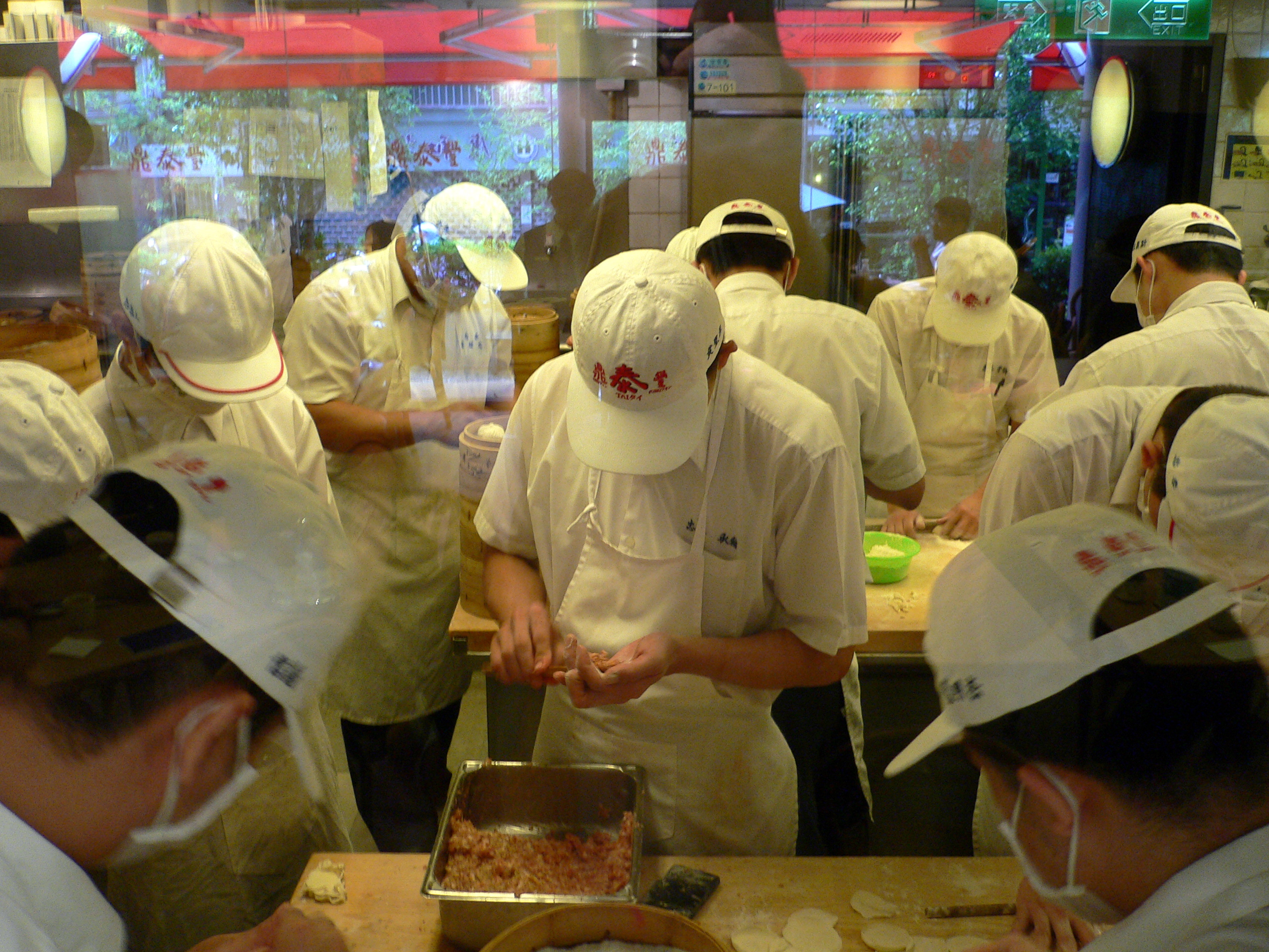 Making dim sum dumplingsTaiwan